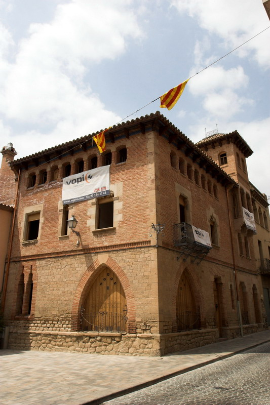 Can Raspall (la Garriga-Vallès Oriental-Catalunya), obra de Manuel Raspall 1903